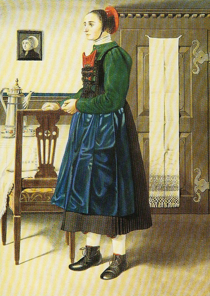 Scan einer Abbildung der Hinterländer Tracht aus Wallau (ehem. Untergericht Breidenbacher Grund)